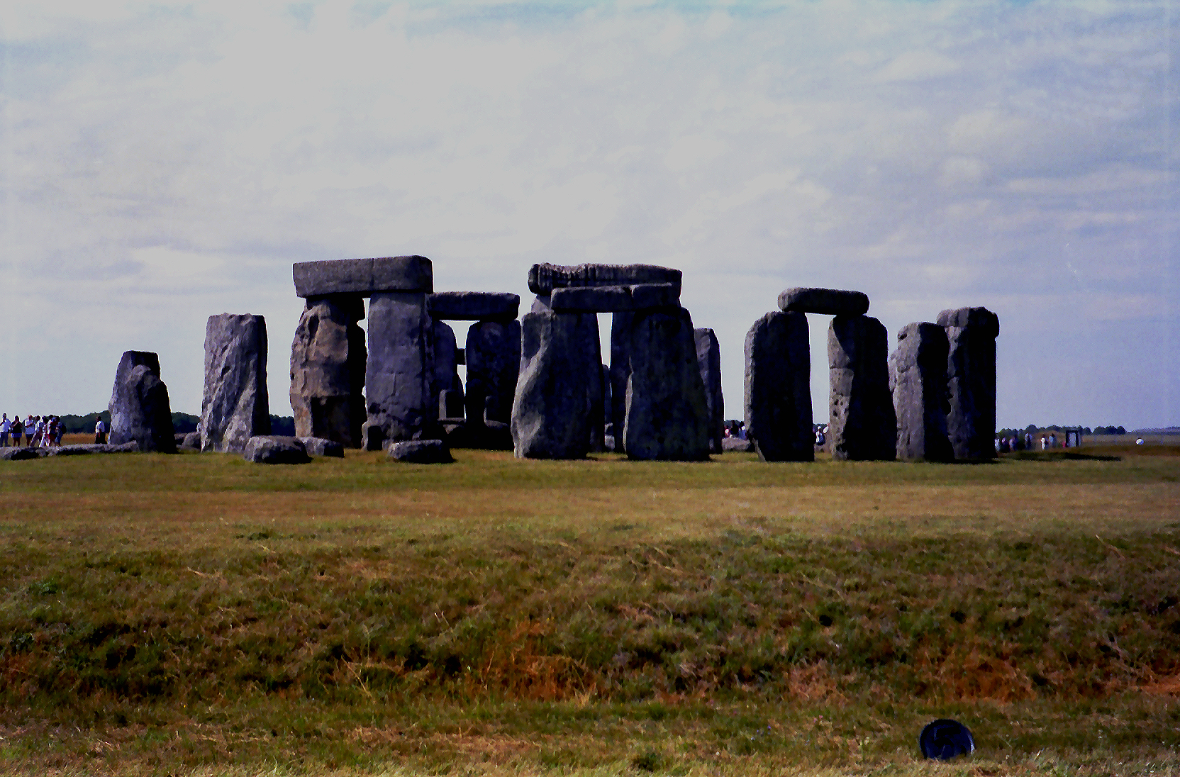 Stonehenge